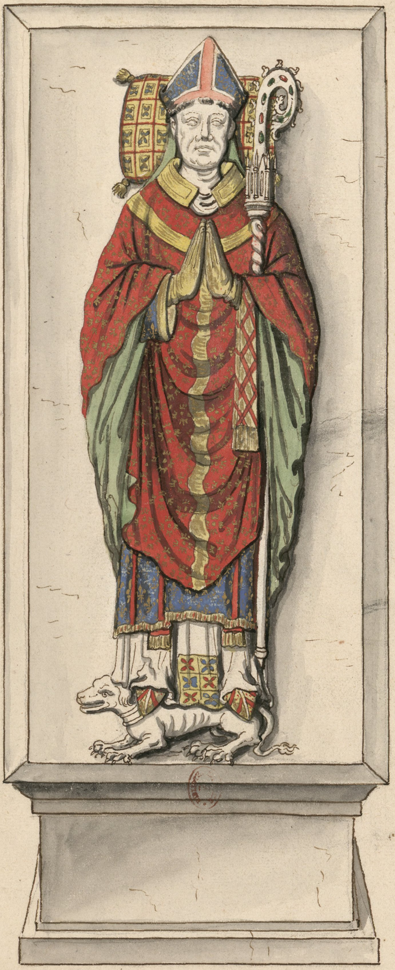 Tombeau en forme de socle vu à plat, sur lequel est couchée la statue peinte d'un prélat mitré et crossé